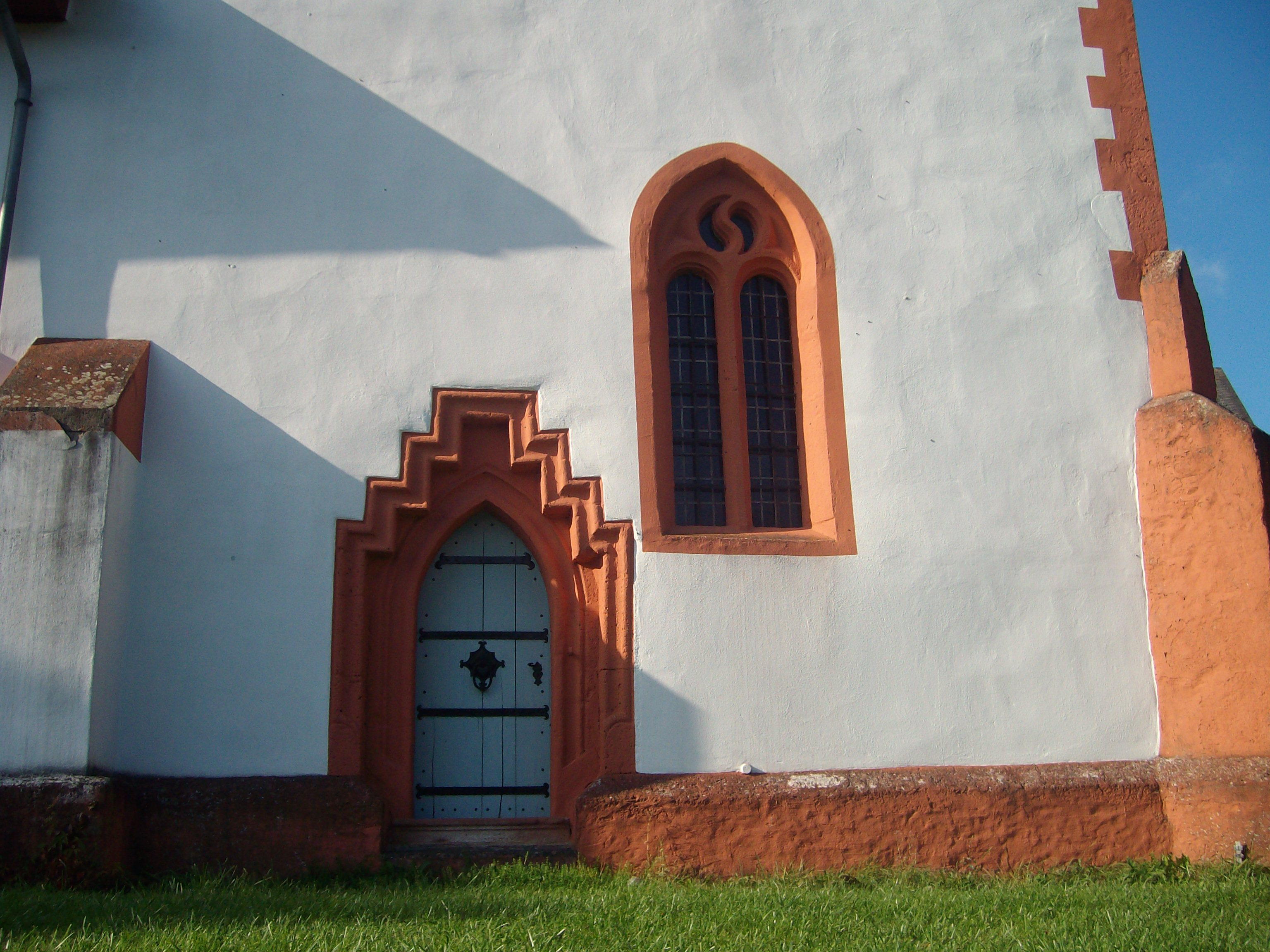 Südportal der Evangelischen Kirche Gonterskirchen, Laubach, Landkreis Gießen, Hessen, Deutschland